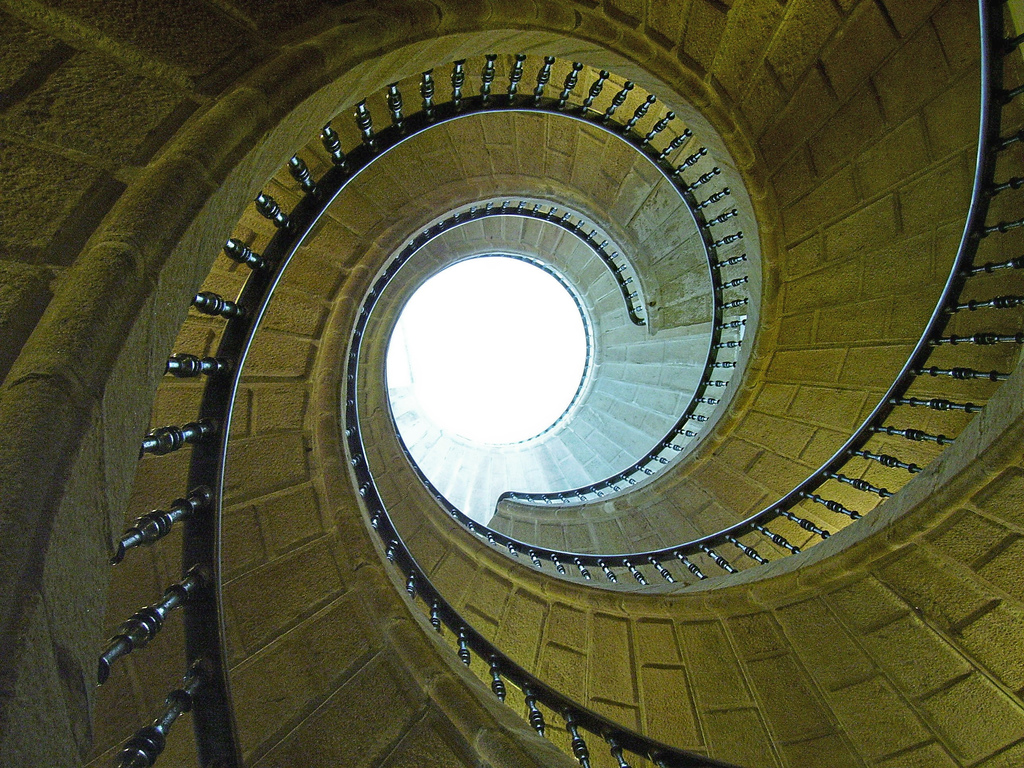 Escaleira do Museo do Pobo Galego